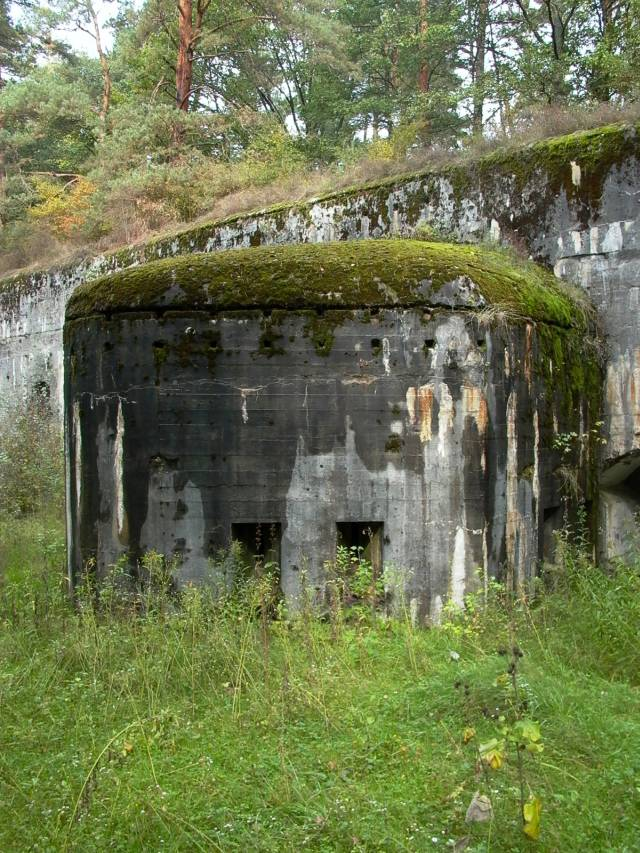 Fotografia przedstawia fragment dzieła lewobarkowego Grupy Fortowej „Carski Dar” Twierdzy Modlin.